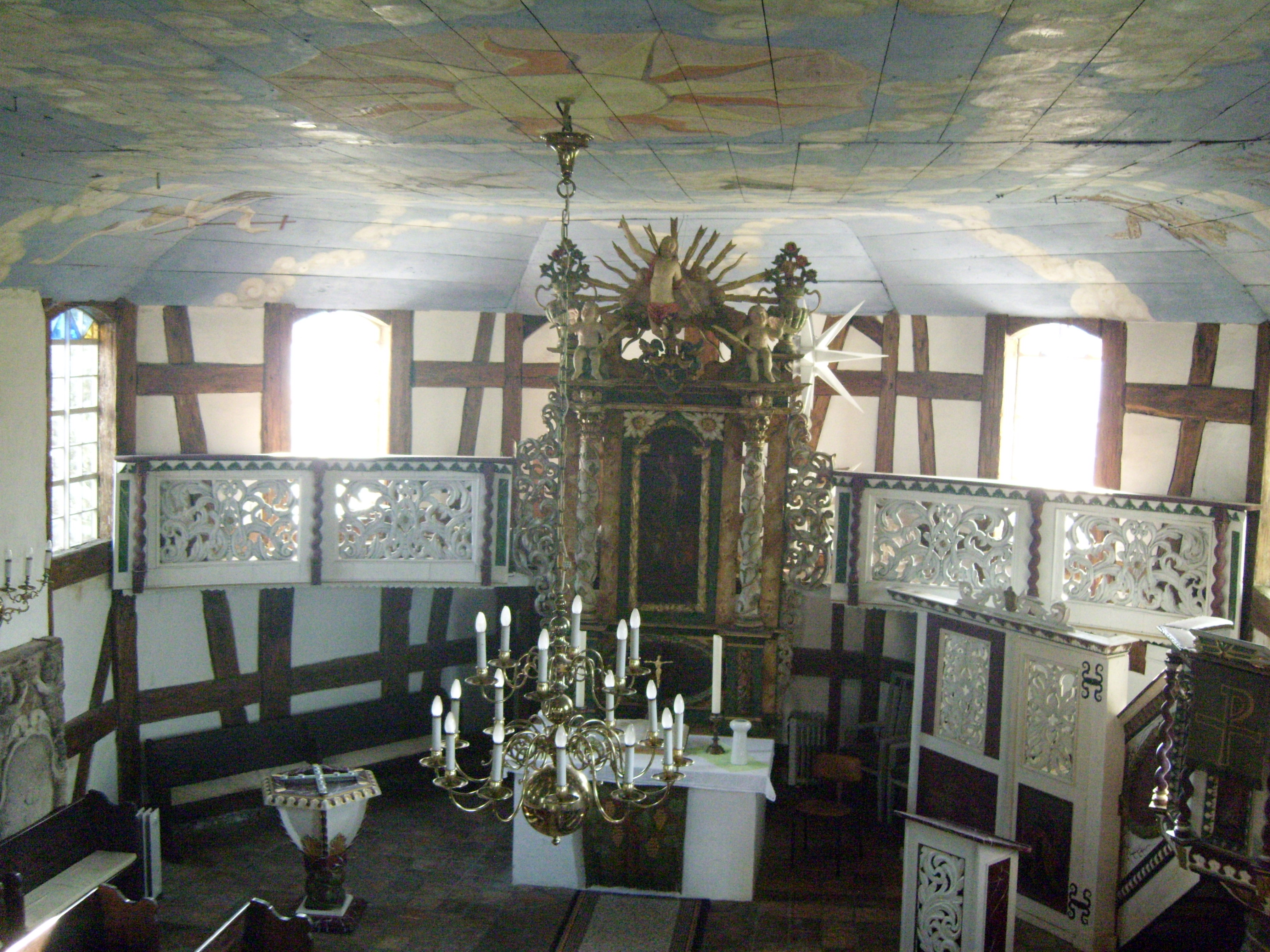 Denkmalgeschützte Fachwerkkirche Waldow Schönwald Der Chorraum